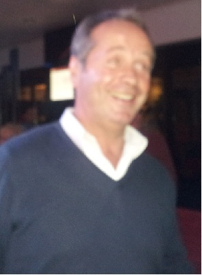 Beppe Dossena alla festa dei 30 anni del "Derby del 3 a 2" Categoria:Immagini di Giuseppe Dossena